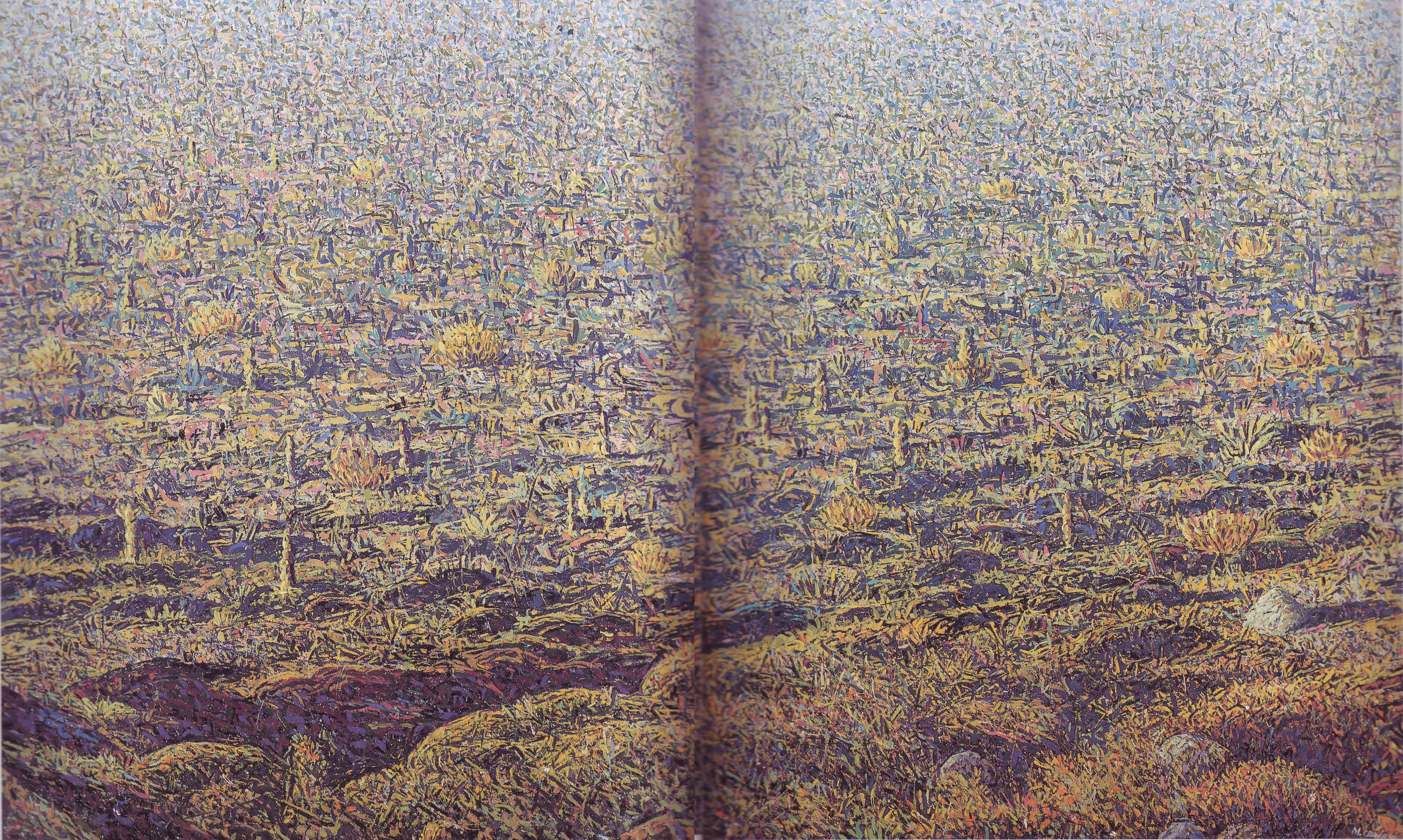 Mahmut Celayir: Landschaft, Öl auf Leinwand, 150 x 250 cm, 1991.